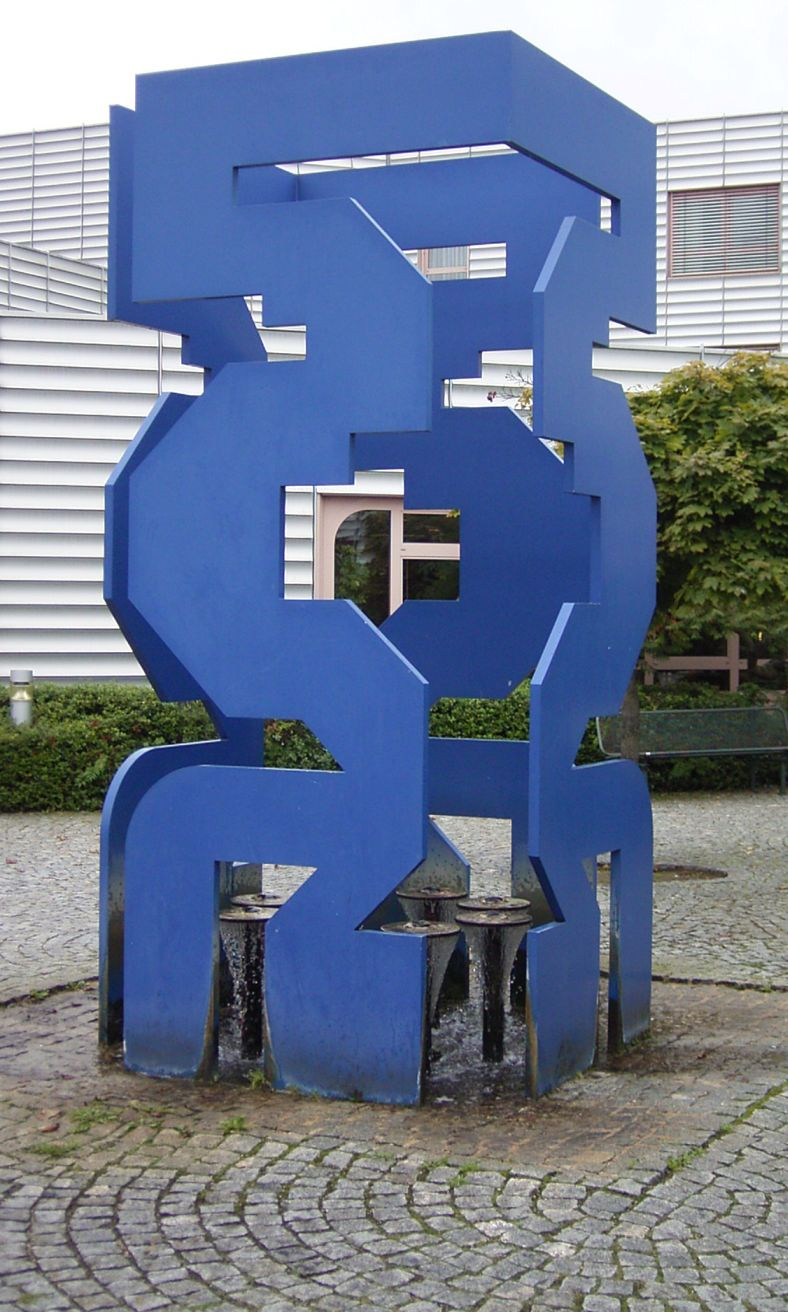 Brunnenobjekt vor dem Kreiskrankenhaus Weißenburg 1985 Datum: 25. Aug. 2005 Ort: Weißenburg in Bayern (Kreiskrankenhaus)